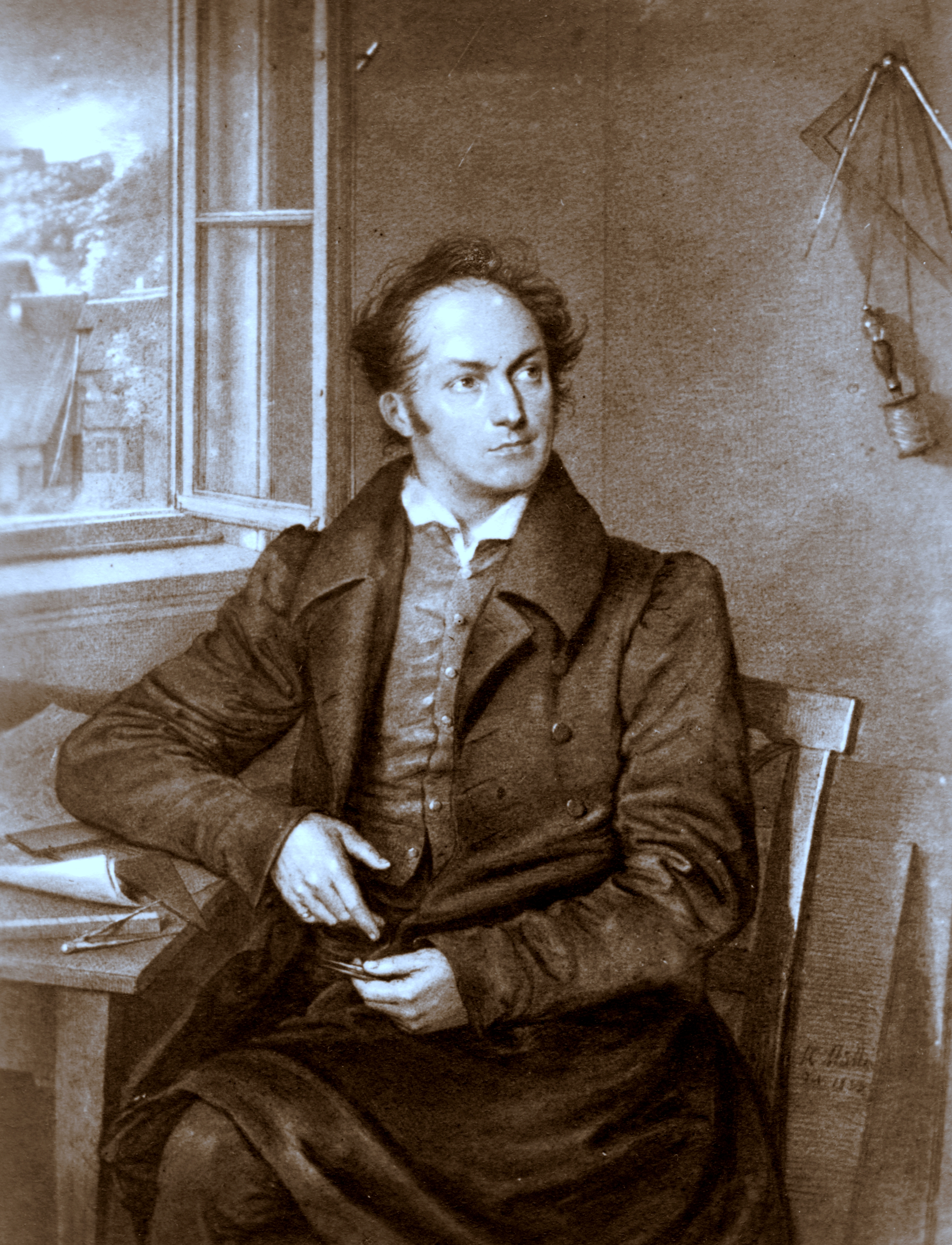 Der deutsche Architekt, Ziegeleifabrikant und Großherzoglich-Sächsisch-Weimar-Eisenacher Baurat Johann Friedrich Wilhelm Sältzer (1779-1853)